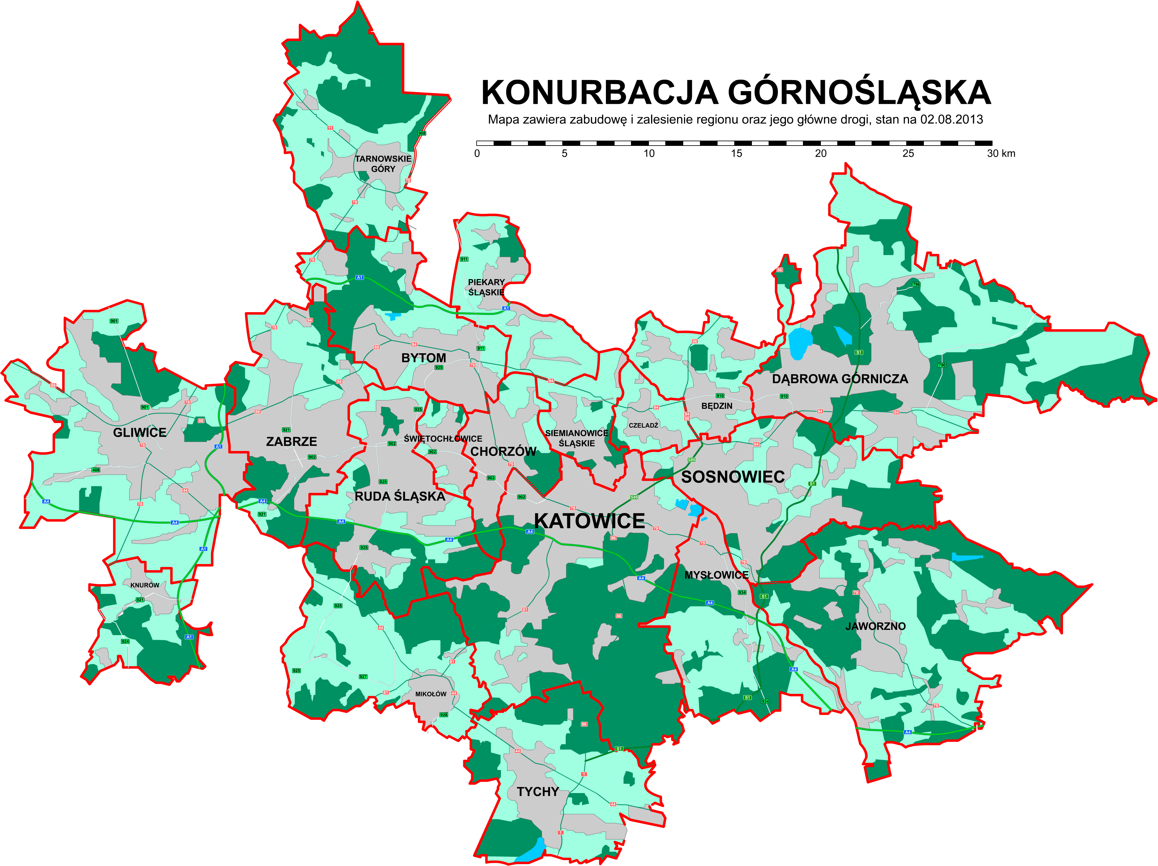 Mapa konurbacji górnośląskiej zawierająca zabudowę i zalesienie terenu oraz jego główne drogi